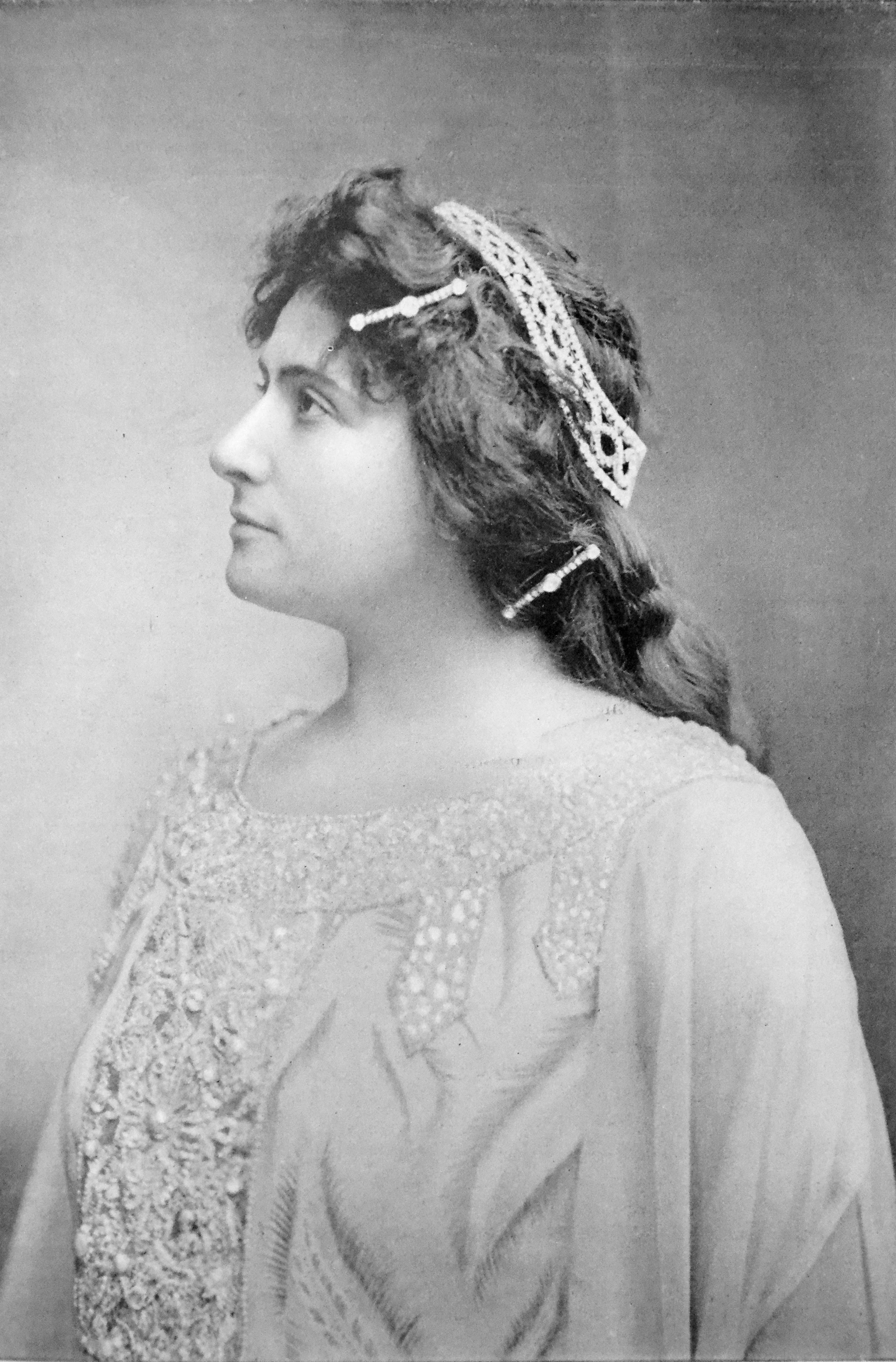 Portrait de Lucienne Bréval, ; comédienne française (photo faite avant 1902), trouvée dans un article ancien de la "Revue illustrée" (Tome relié 1902) intitulée "Lucienne Bréval"